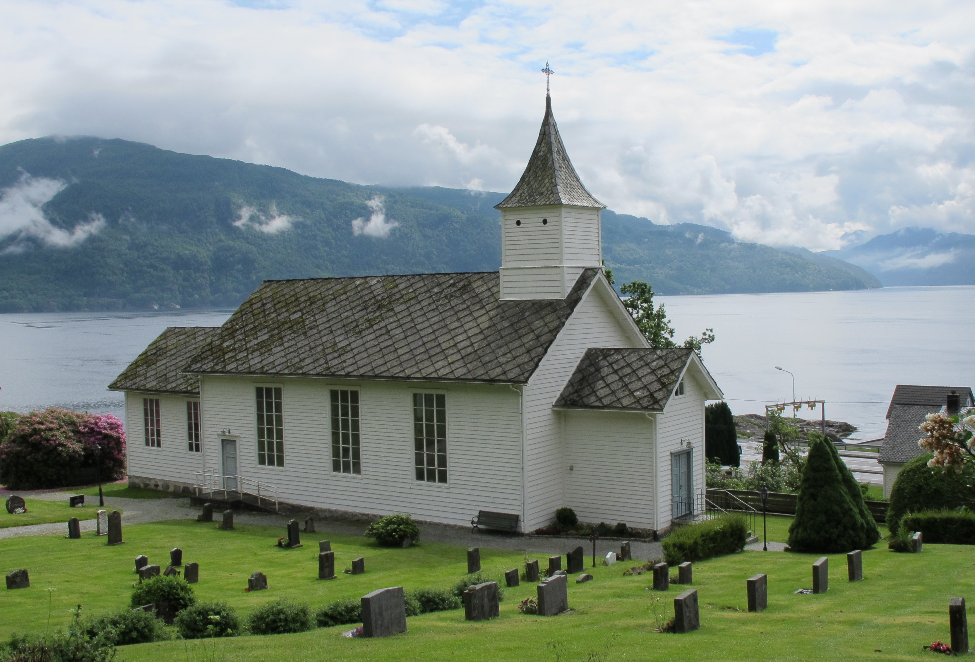 Holmedal kyrkje, juni 2017.